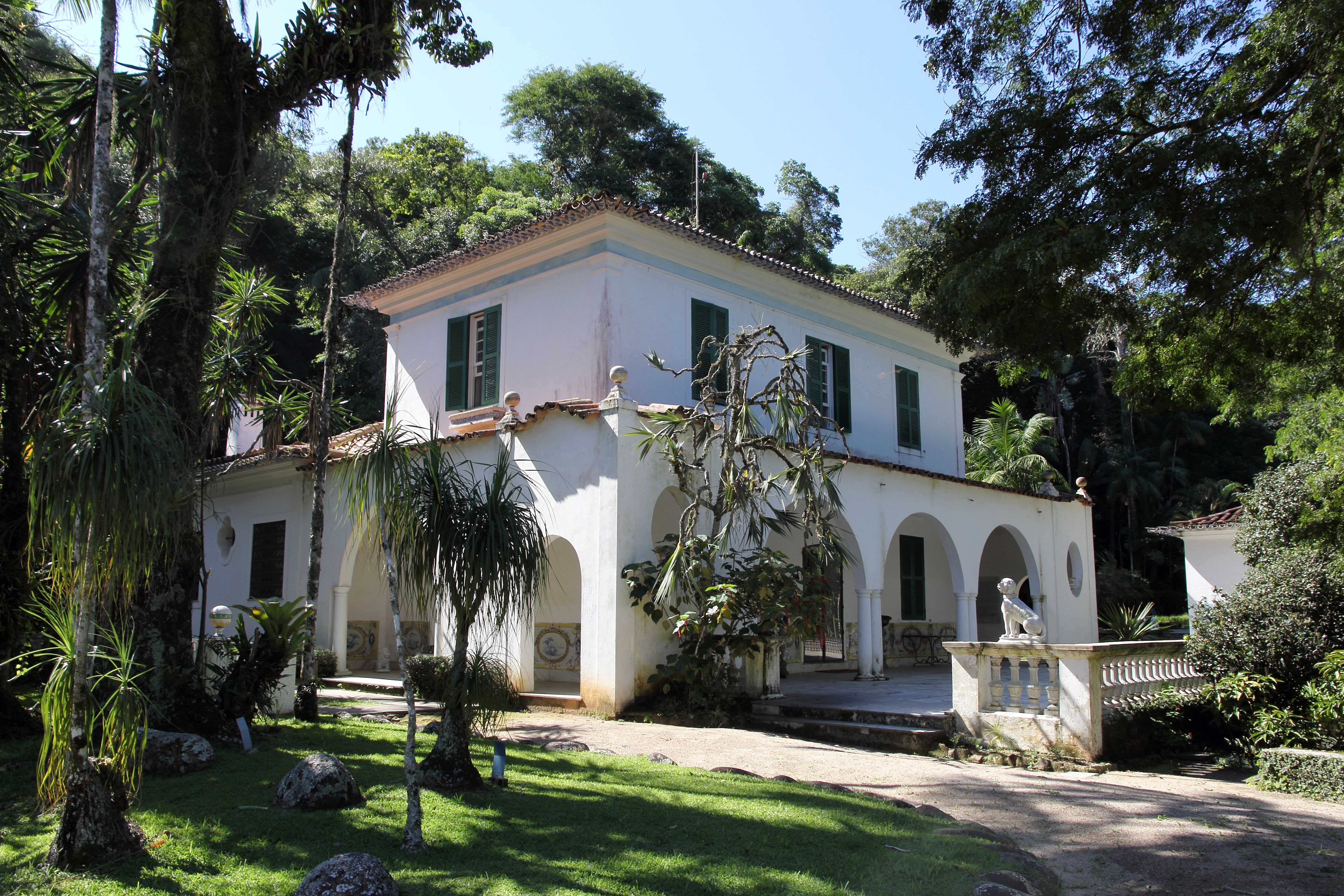 Museus Castro Maya – Museu do Açude, no Alto da Boa Vista.